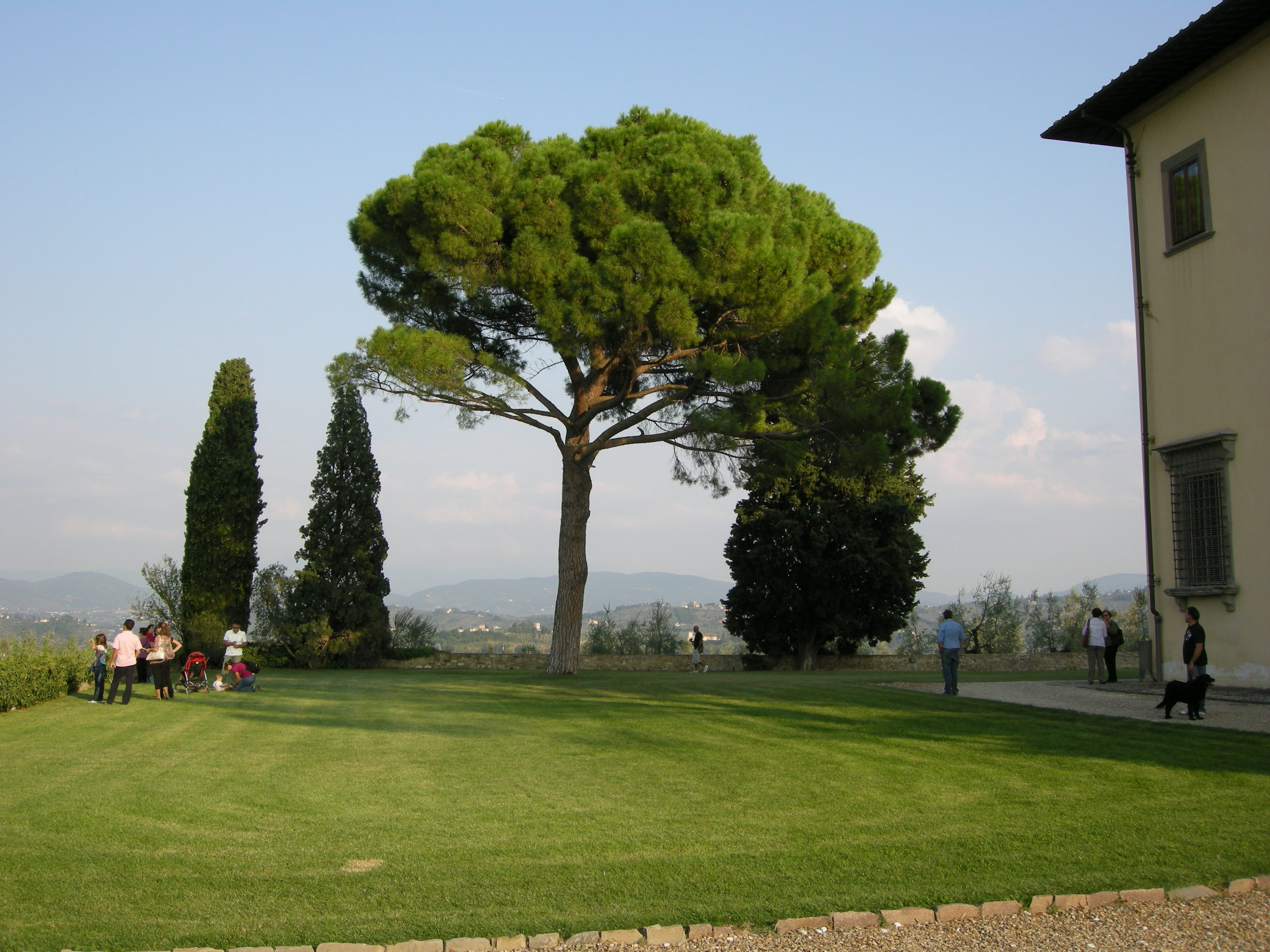 Villa la sfacciata, prato